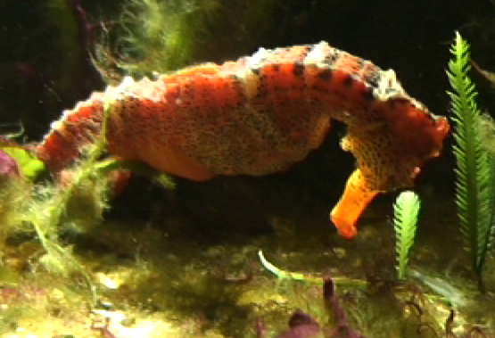 Hippocampus reidi brasil male